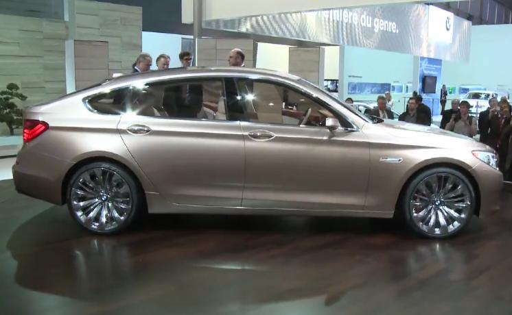 BMW_Série_5_GT_Concept au salon de Genève 2009